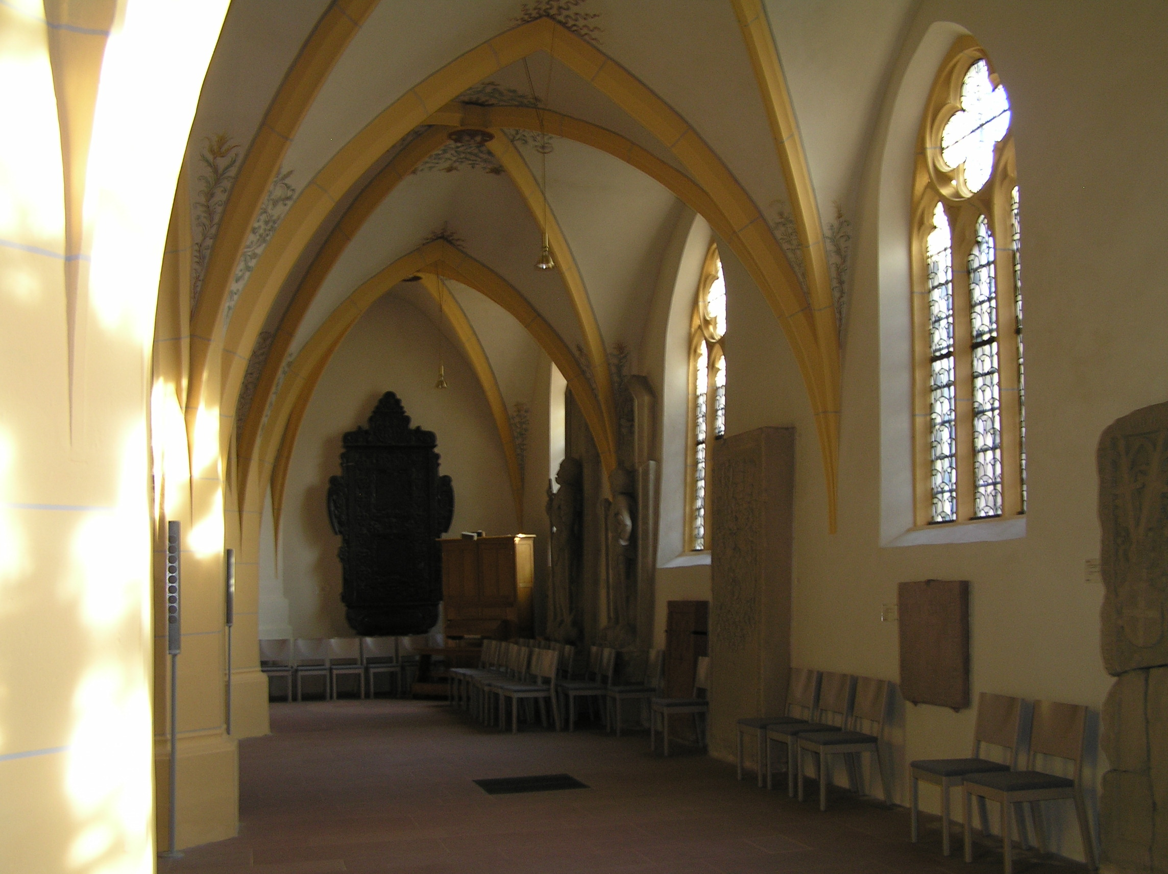 Südliches Seitenschiff der Burgkirche in Ingelheim